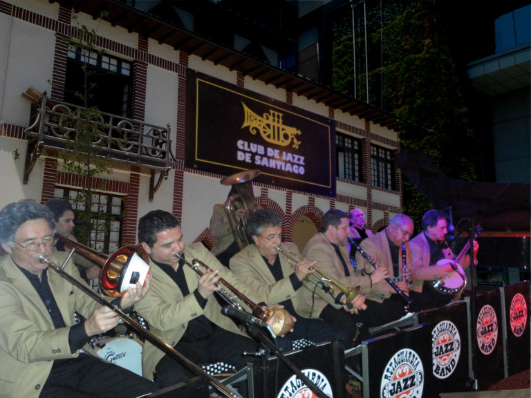 Presentacion grupo RETAGUARDIA JAZZ BAND en el frontis del Club de Jazz Pza. Egaña